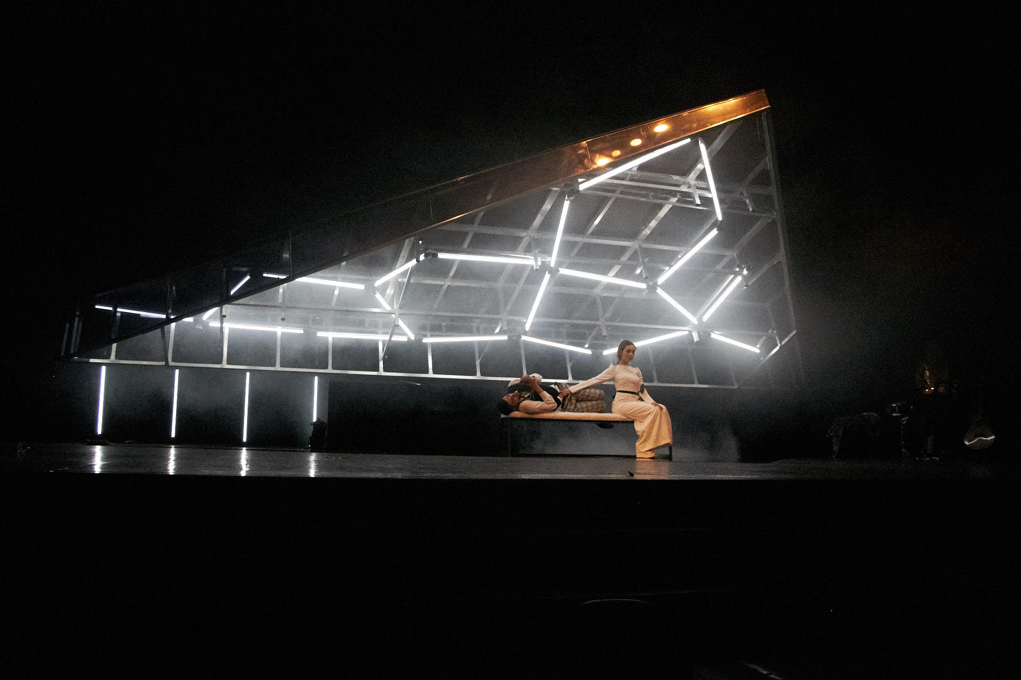 Snimak scenografije pozorišne predstave Pet života pretužnog Milutina-Atelje 212, 2018. Autor:Jasmina Holbus